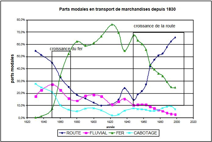 Part modale des modes de transport depuis 1830.